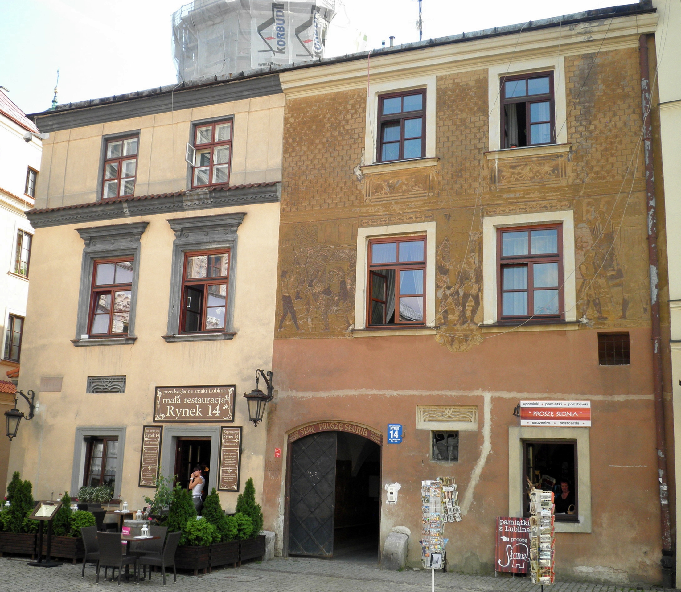 Kamienica przy Rynku 14 na Starym Mieście w Lublinie - oba domy